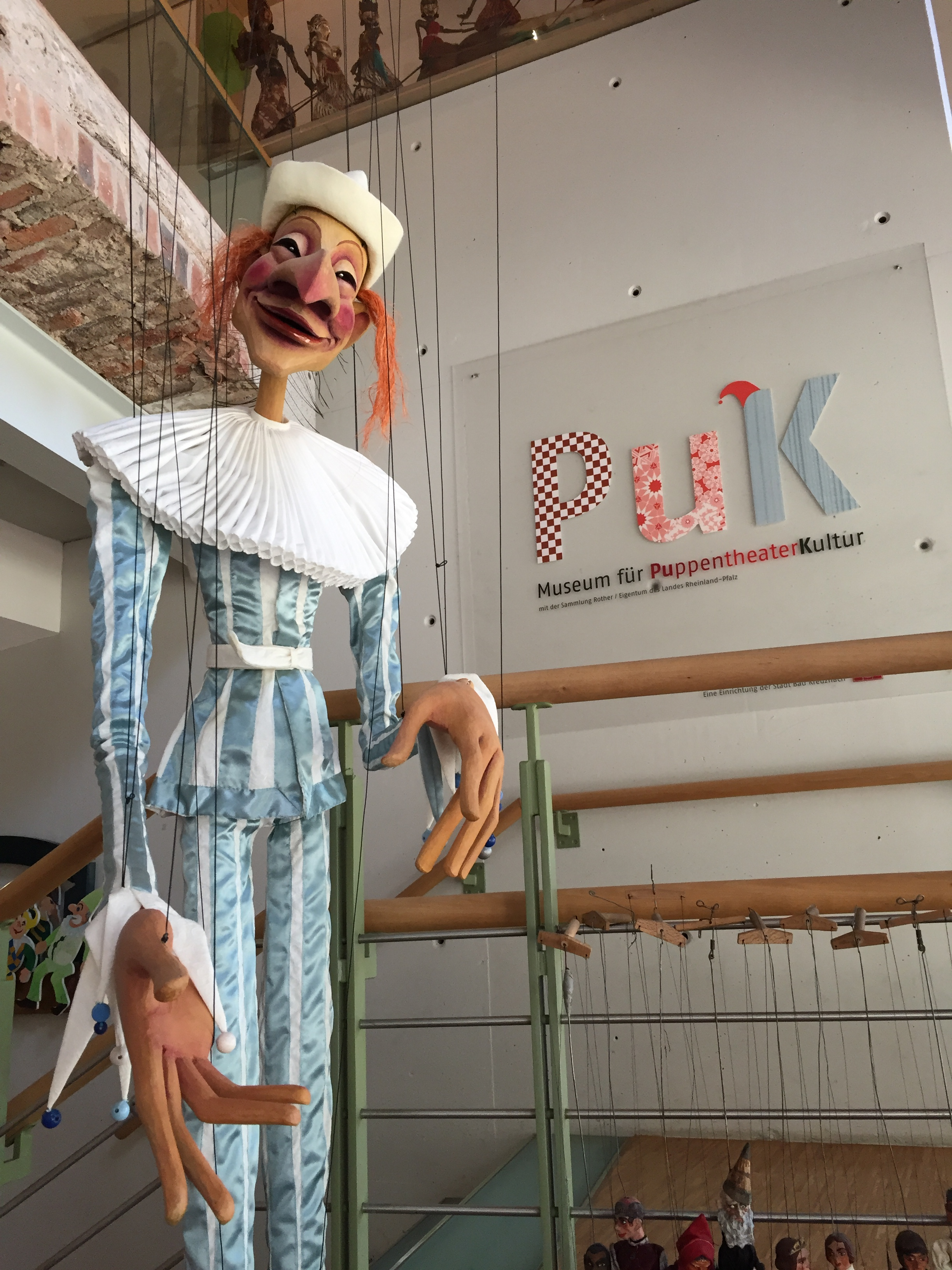 PuK Museum für PuppentheaterKultur im Rittergut Bangert in Bad Kreuznach